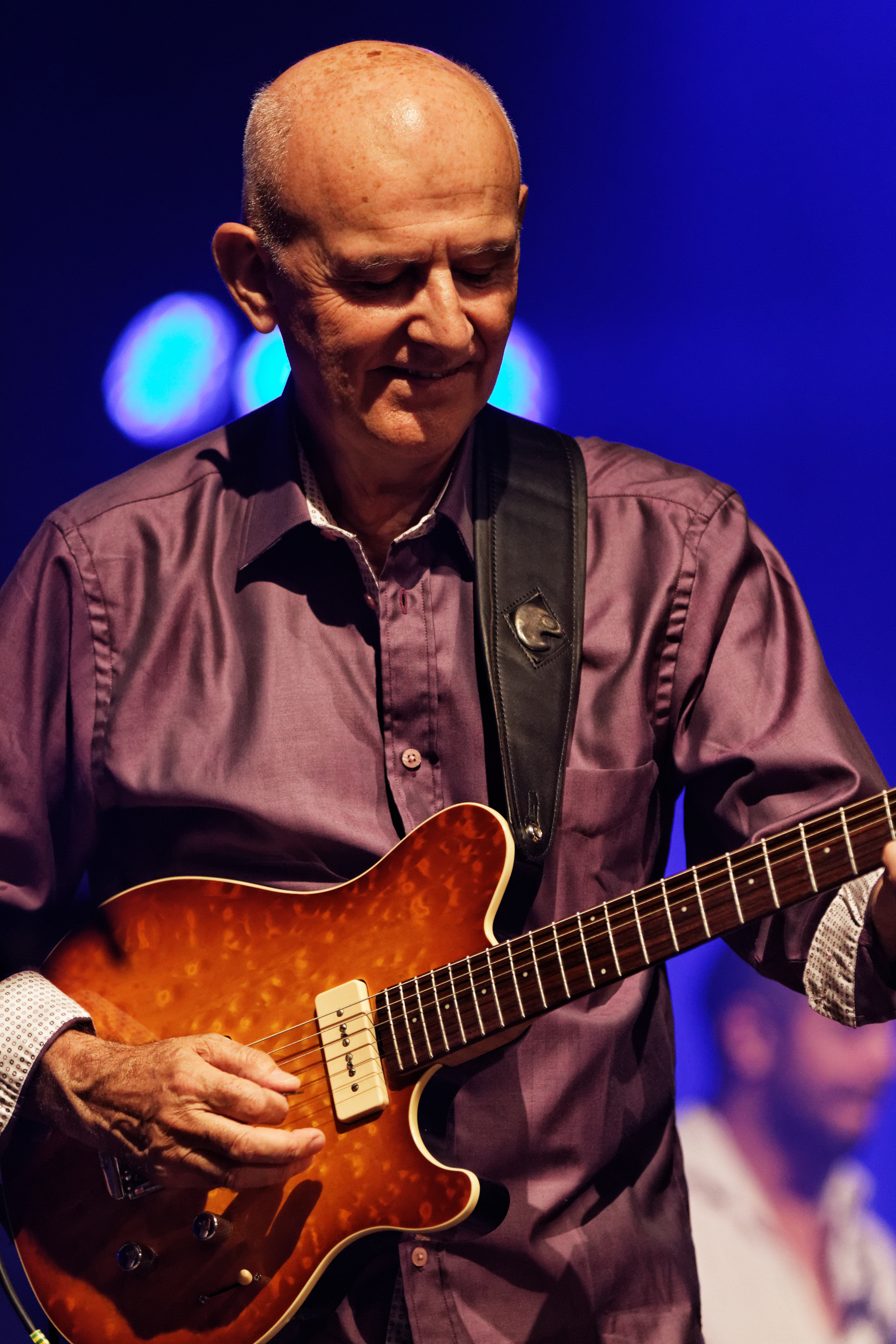 Dan ar Braz en concert sur la scène Gradlon lors du festival de Cornouaille 2013.